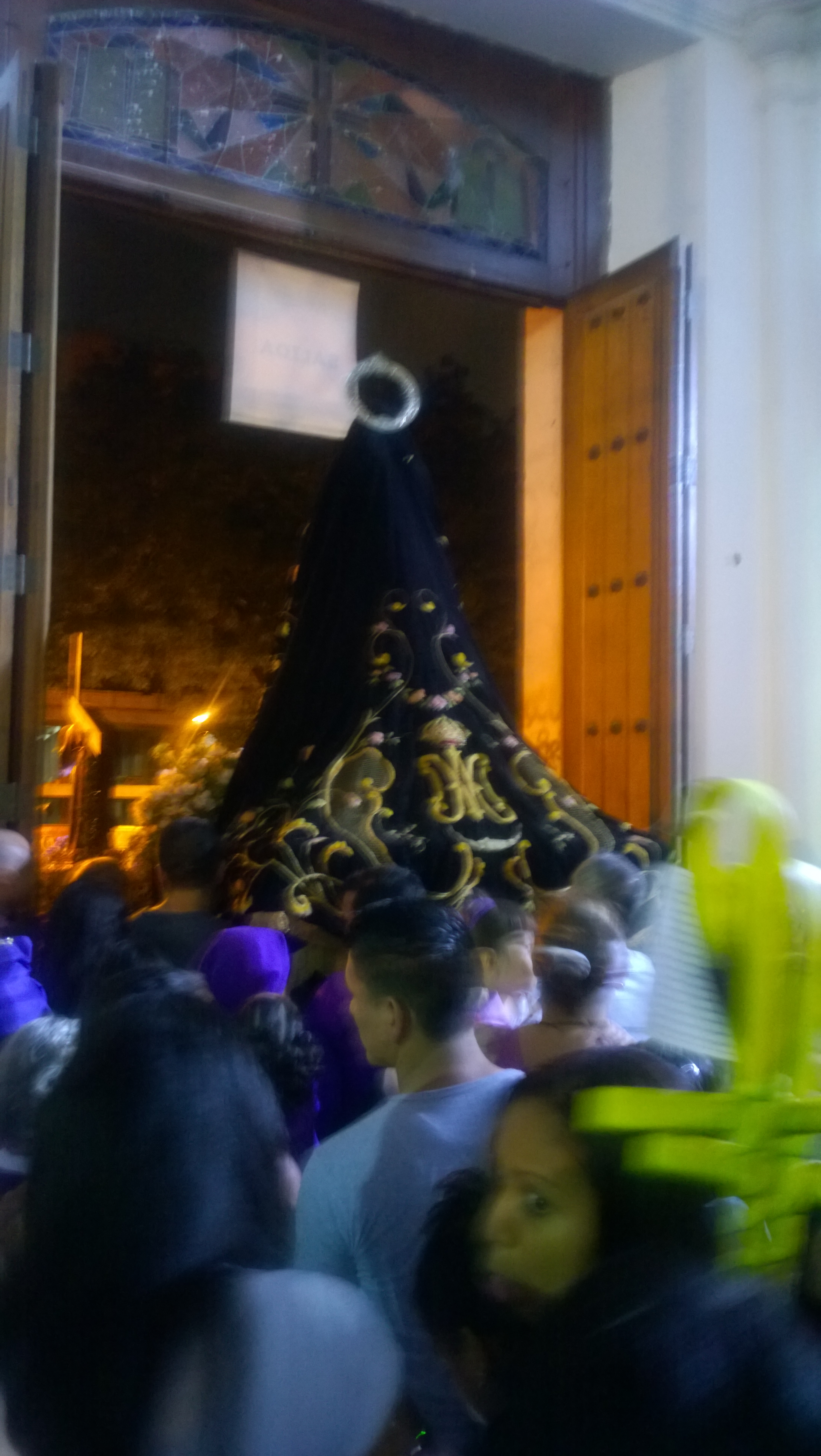 luego de la misa del miercoles santo, nos disponemos a salir en procesión con nuestro amado Jesus Nazareno y La Dolorosa detras de El